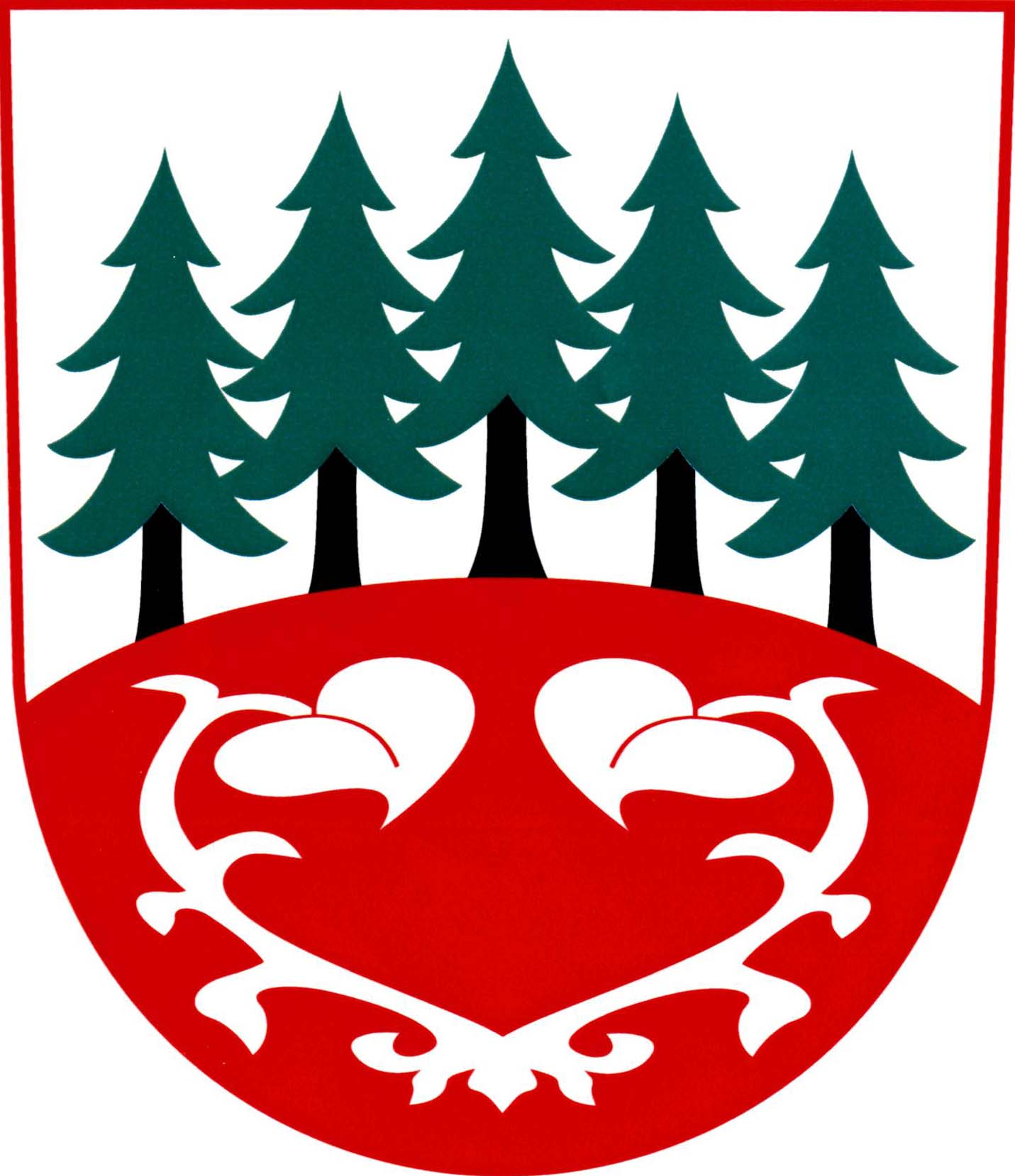 Znak obce Vršovka